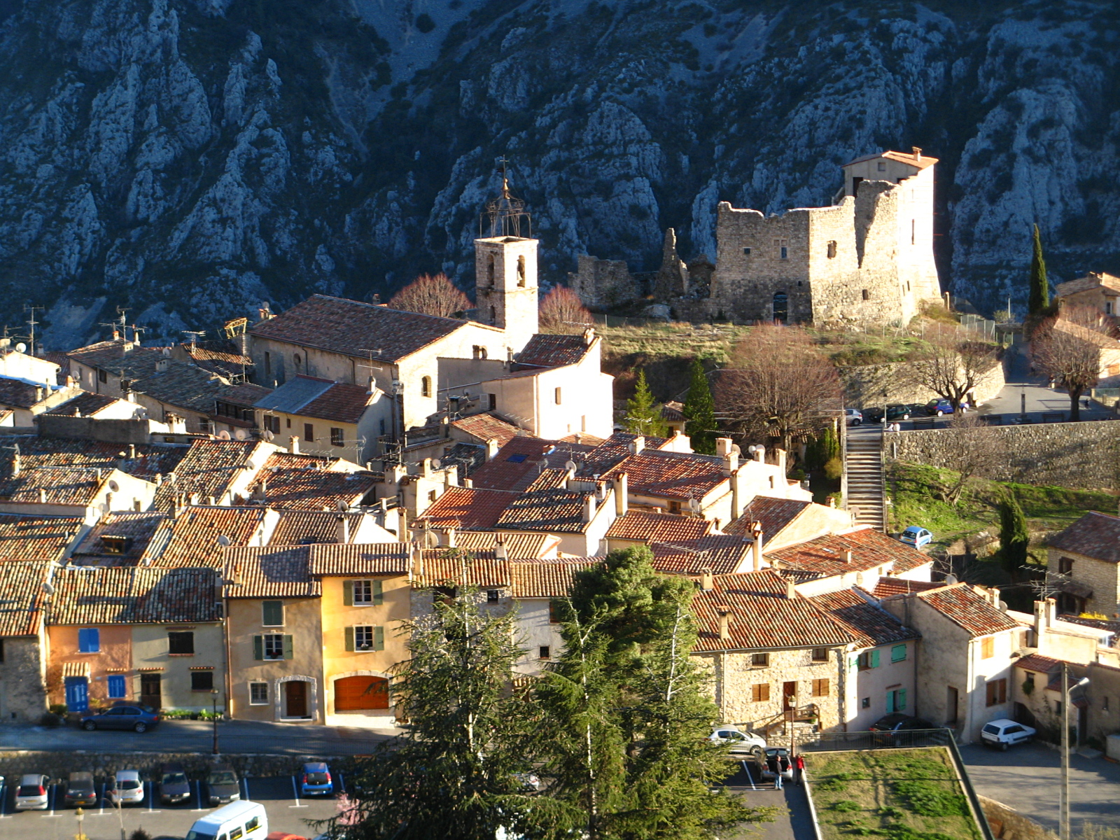 Détail du village de Gréolières (Alpes-Maritimes, France)